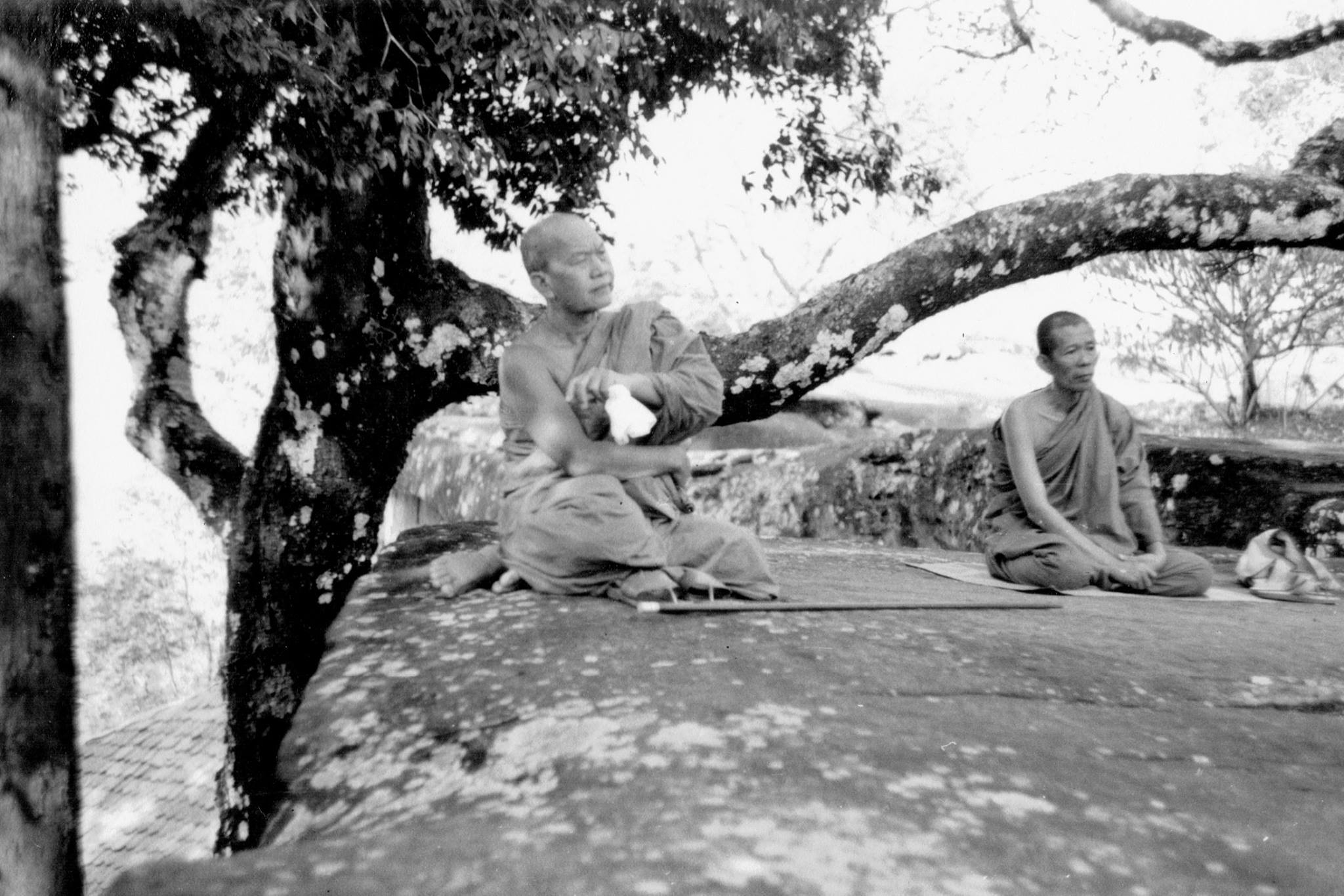 พระอาจารย์ฝั้น อาจาโร ต้อนรับคณะพระภิกษุอาคันตุกะที่เดินทางมาจากวัดป่าบ้านตาด จังหวัดอุดรธานี บันทึกภาพที่วัดถ้ำขาม จังหวัดสกลนคร เมื่อ เดือนเมษายน พ.ศ. 2508 โดย หม่อมหลวงชัยนิมิตร นวรัตน ภาพดังกล่าวนี้เจ้าของภาพอนุญาตให้เผยแพร่ทั่วไปได้ ดังปรากฎข้อความในสถานะเว็บไซต์เฟซบุ๊ค "ม.ล. ชัยนิมิตร นวรัตน" วันที่ 8 กุมภาพันธ์ พ.ศ. 2560 ดังนี้ "ภาพประวัติศาสตร์ผมถ่ายเองเมื่ออายุ ๑๖ ลิขสิทธิ์มี แต่สำหรับผู้ที่ศรัทธานับถือสมเด็จพระสังฆราชอัมพรมหาเถระ สามารถนำไปเผยแพร่ต่อได้เลยครับไม่จำเป็นต้องขอ แต่ใครเอาไปใช้แล้ว โปรดอย่าไปอ้างตนเป็นเจ้าเข้าเจ้าของเสียเองก็แล้วกัน"